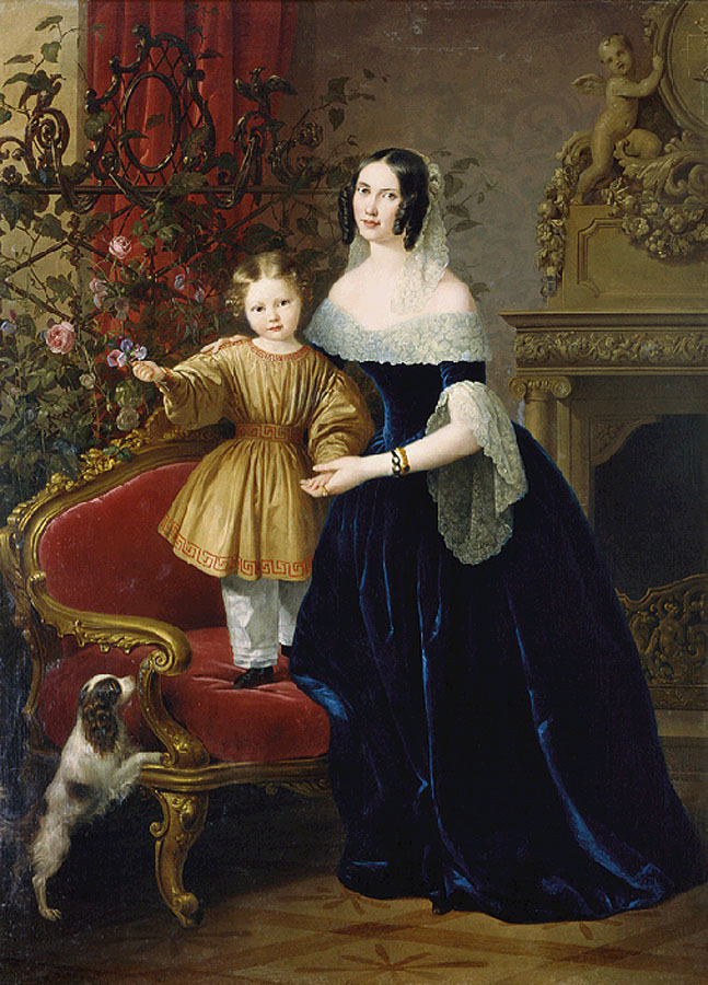 Портрет неизвестной с ребенком и собачкой. Портрет поступил в музей в 1964 году из Министерства Культуры. В углу картины, видна половина герба графов Калиновских. Известно, что художник Козрое Дузи во время своего пребывания в Петербурге писал портреты трех дочерей г-жи Эмилии Челищевой от ее первого мужа графа Калиновского: Северины, Жозефины и Ольги. К моменту написания портретов замужем была только старшая. В дневнике художника от 27.06.1840 года читаем: Графиня Калиновскя заказала мне портрет старшей из сестер, которая замужем за генералом Плаутиным и живет в Царском Селе». 12 июля 1840 года : «Поехал в Царское Село, где графиня Калиновская-Плаутина впервые позировала мне и заплатила 3500 рублей за два портрета ее сестер Ольги и Жозефины». 6 августа 1840 года: «Начиная с 25 июля каждый день ездил в Царское Село рисовать портрет графини Плаутиной». Из этого можно предположить, что на портрете изображена Северина Иосифовна Плаутина, ур. графиня Калиновская (1814—08.06.1852), воспитывалась в Екатерининском институте в Петербурге, который окончила в 1832 году с золотым шифром малой величины, жена генерала Николая Фёдоровича Плаутина. Изображена с сыном Сергеем (1837—1926).